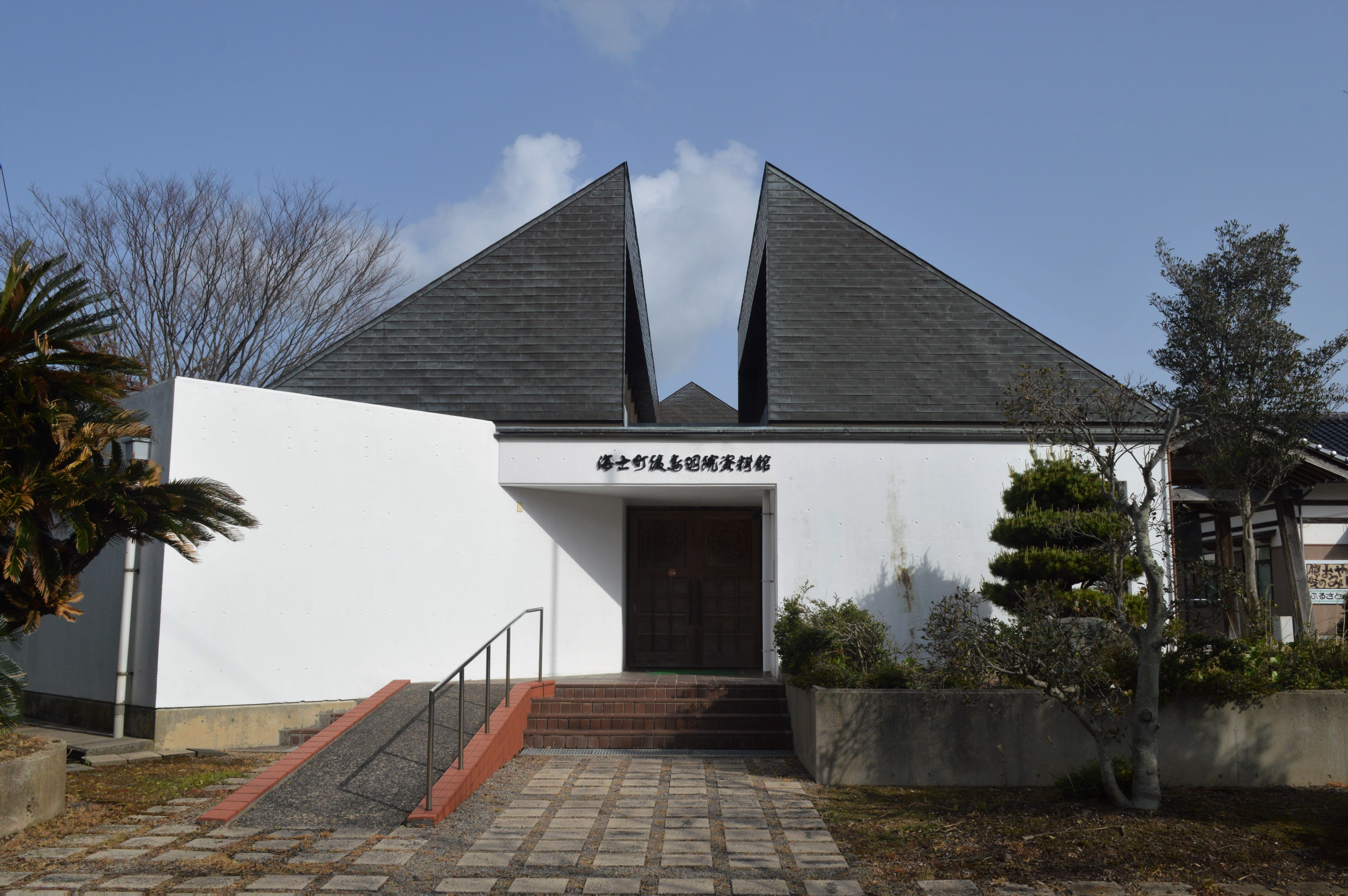 島根県隠岐郡海士町にある海士町後鳥羽院資料館。